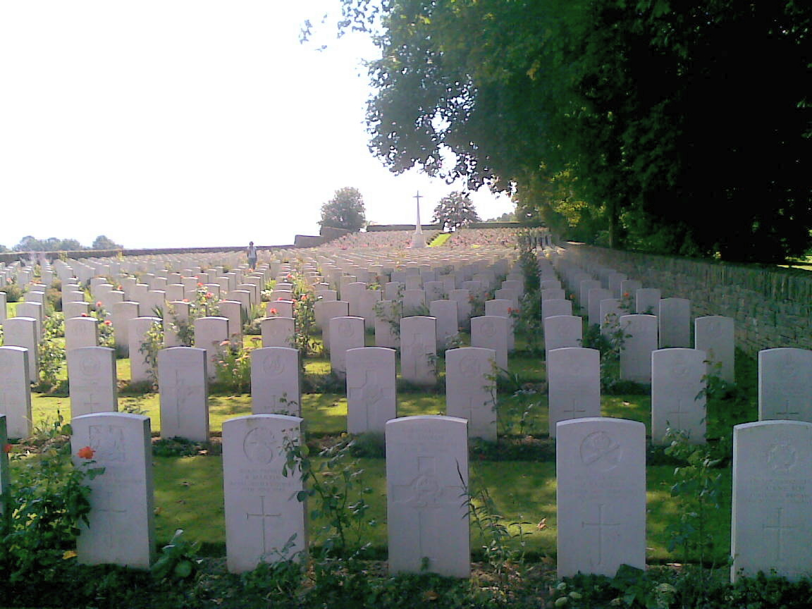 Soldatenfriedhof Niederzwehren-Grabreihen